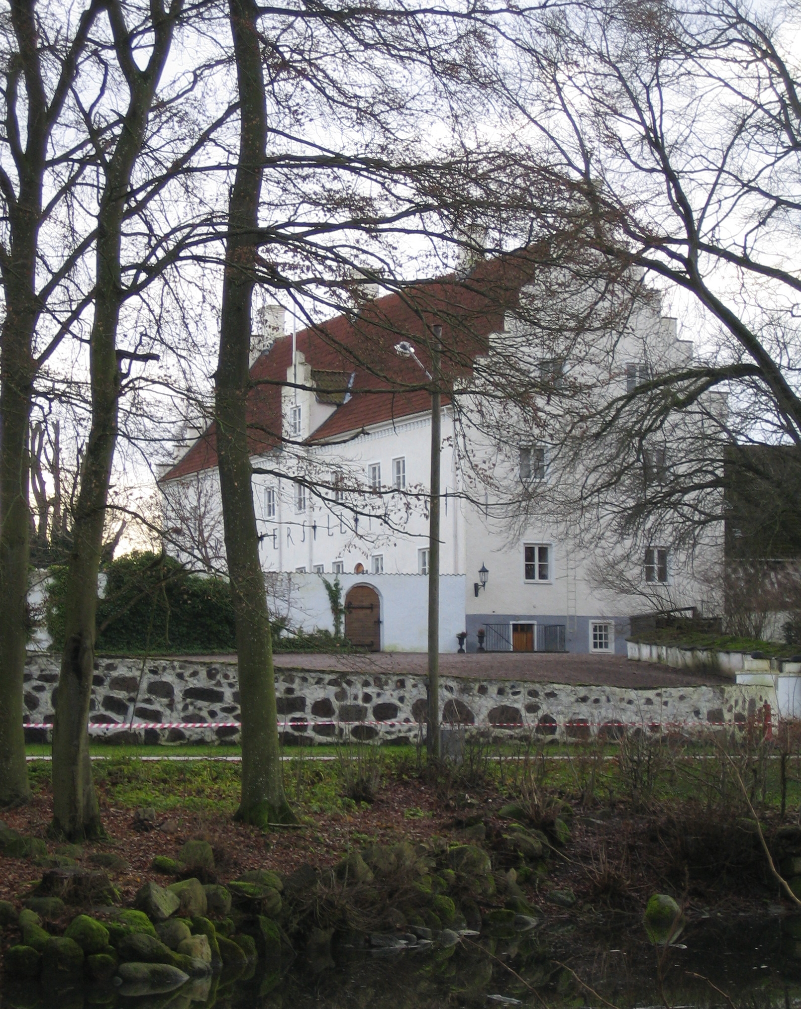 Högestad castle, Skåne, Sweden